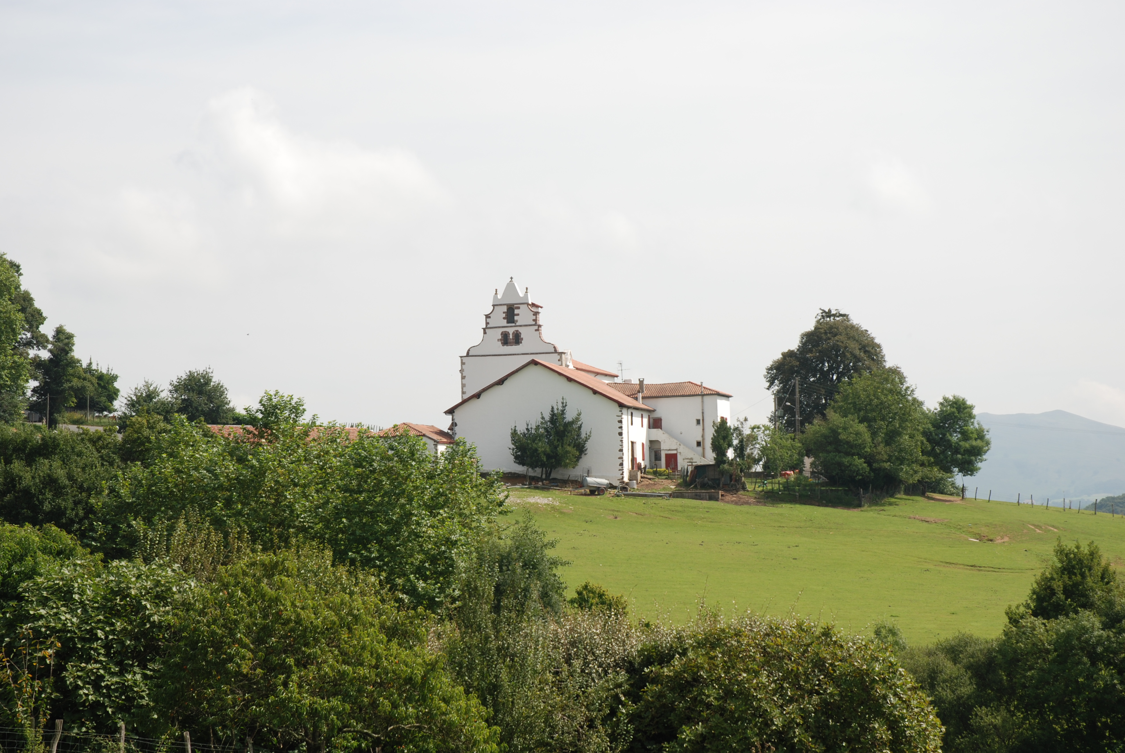 Macaye, l'église